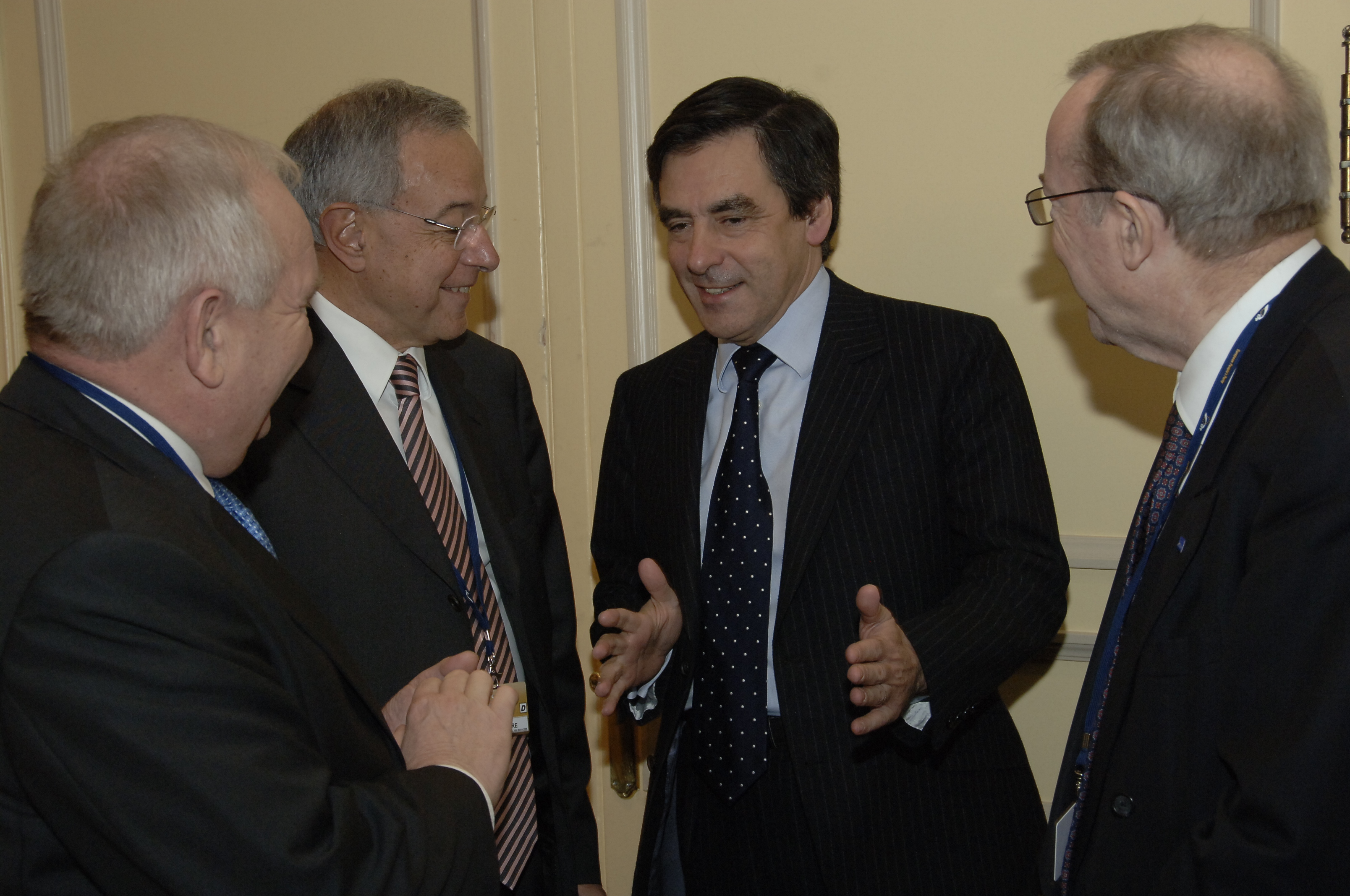 Daul-Lamassoure-Fillon-Martens